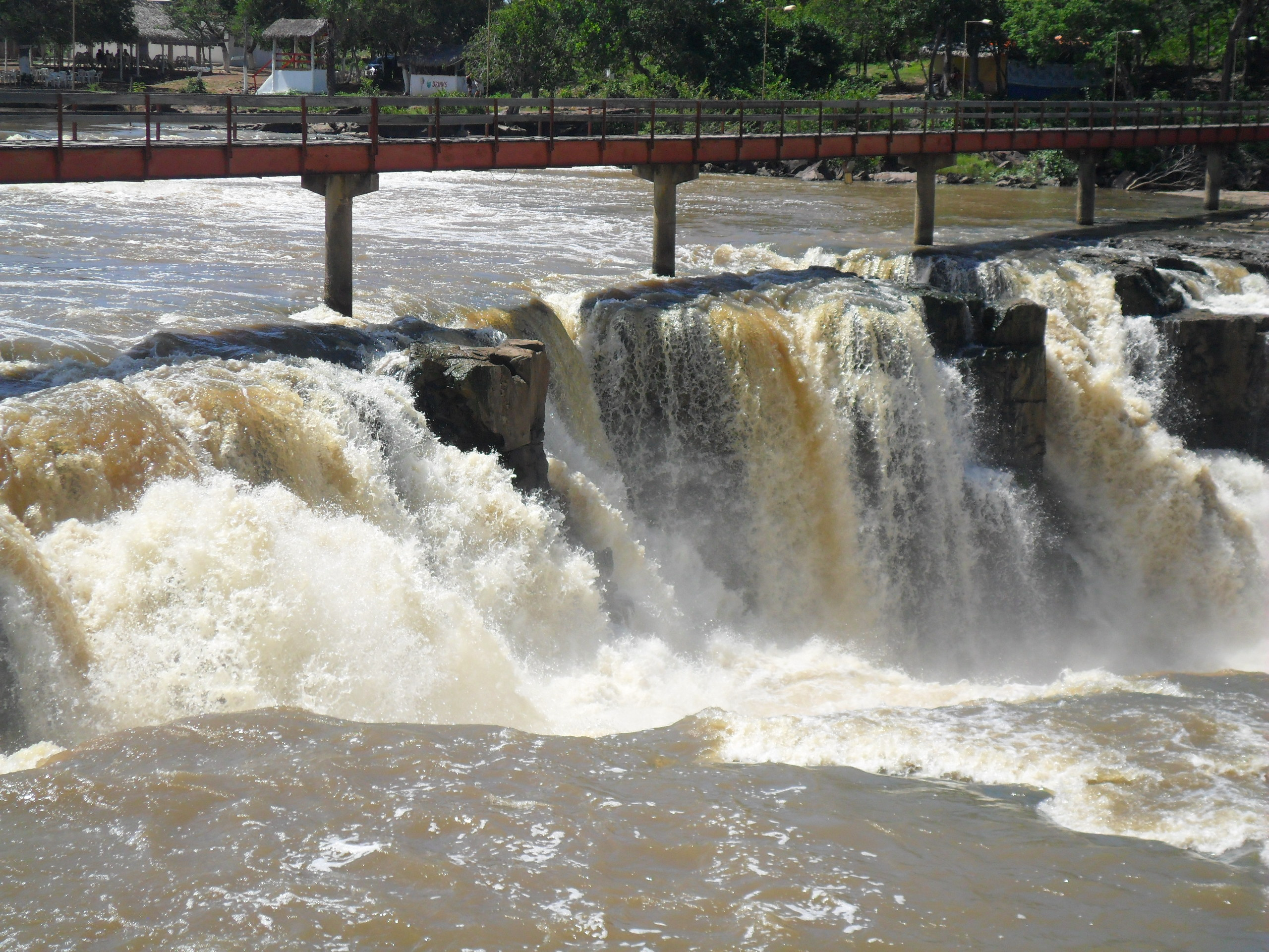 vista da cachoeira do urubu a partir do território de Esperantina-PI